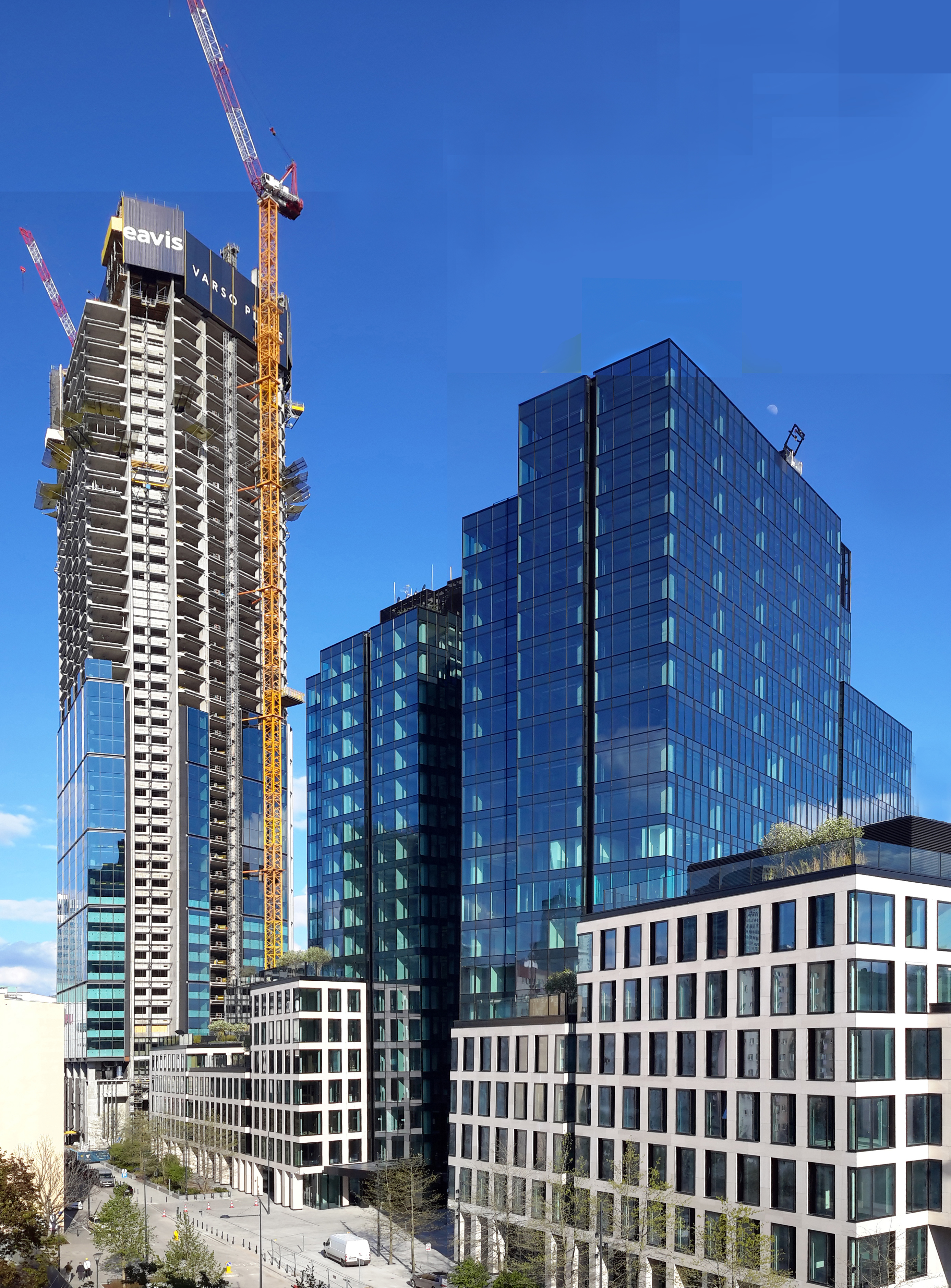 Plac budowy Varso w dniu 1 maja 2020